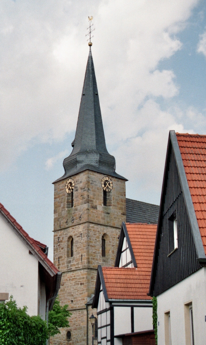 Katholische St.-Marien-Kirche Bevergern, Nordrhein-Westfalen, Deutschland.